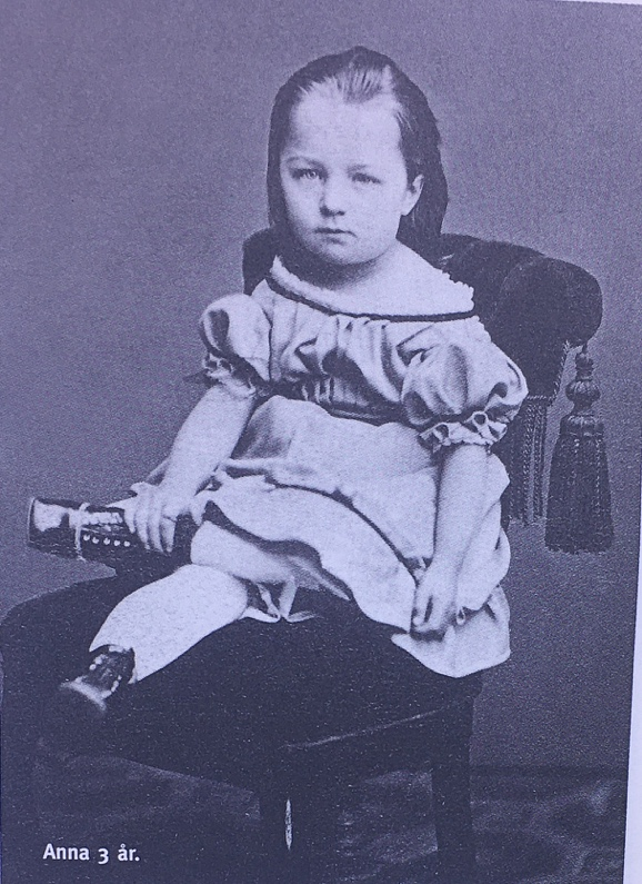 Anna Hammarström, senare Hofman-Uddgren, 3 år. IMG 9224